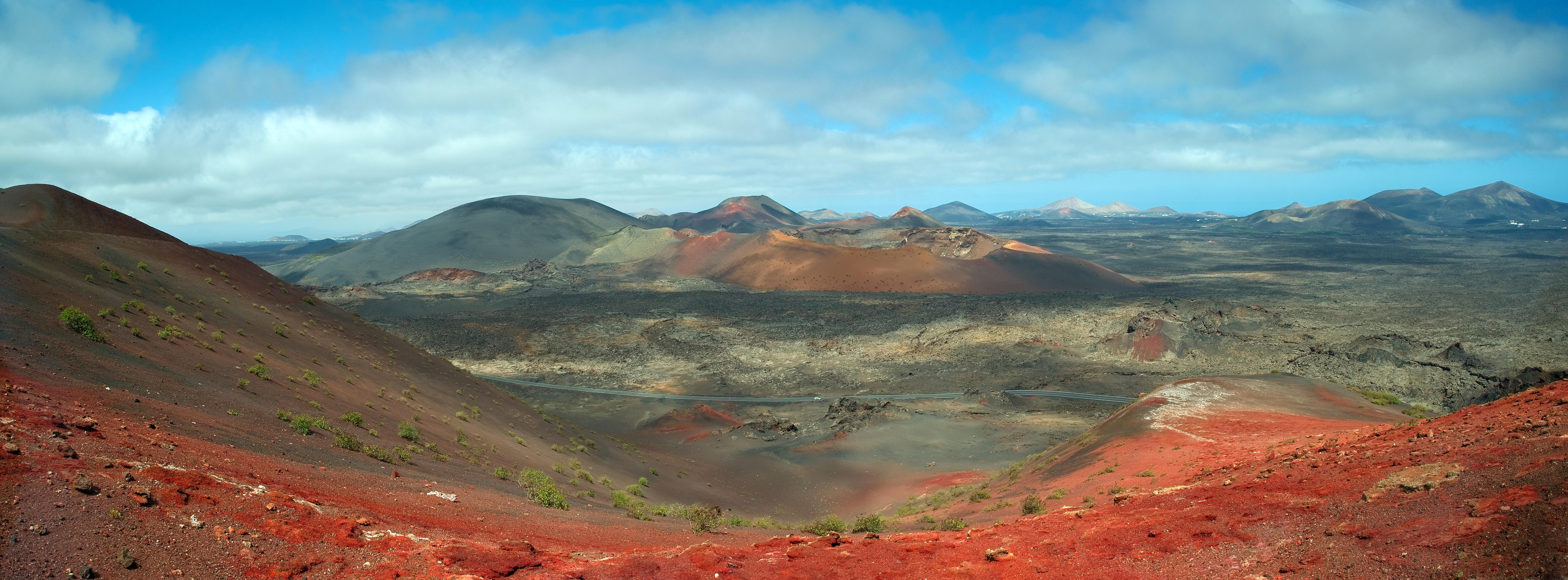 Parc naturel des volcans de Timanfaya Lanzarote îles Cannaries (Espagne)